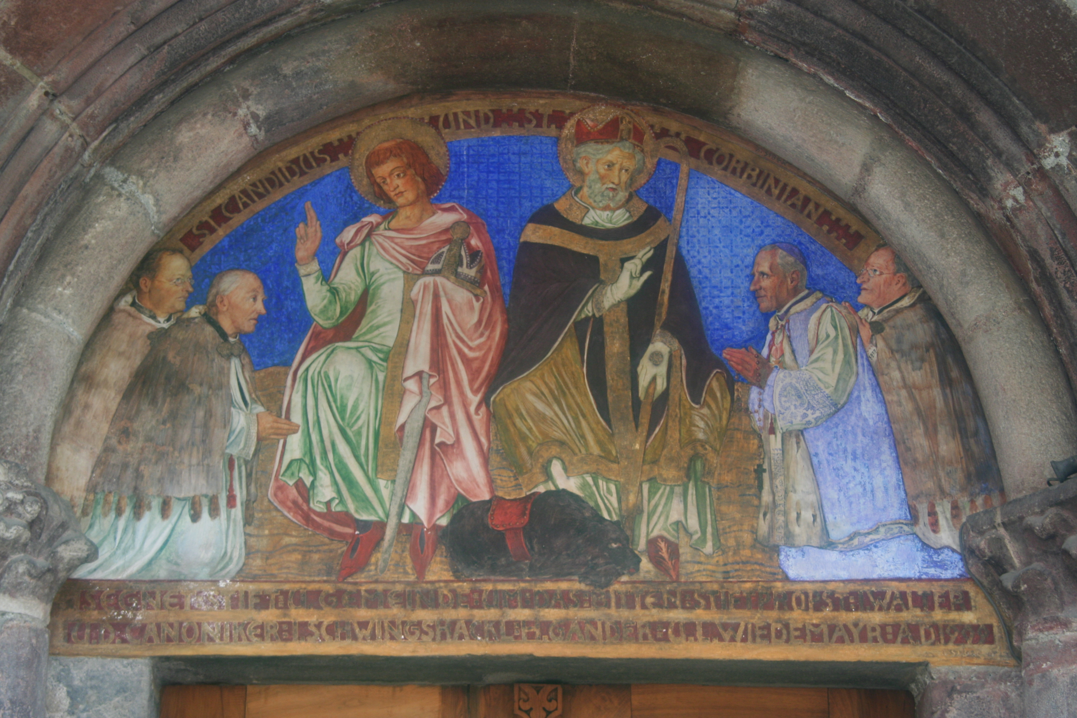 Gemälde über dem Nordportal der Stiftskirche Innichen, 1909 von Alfons Siber geschaffen